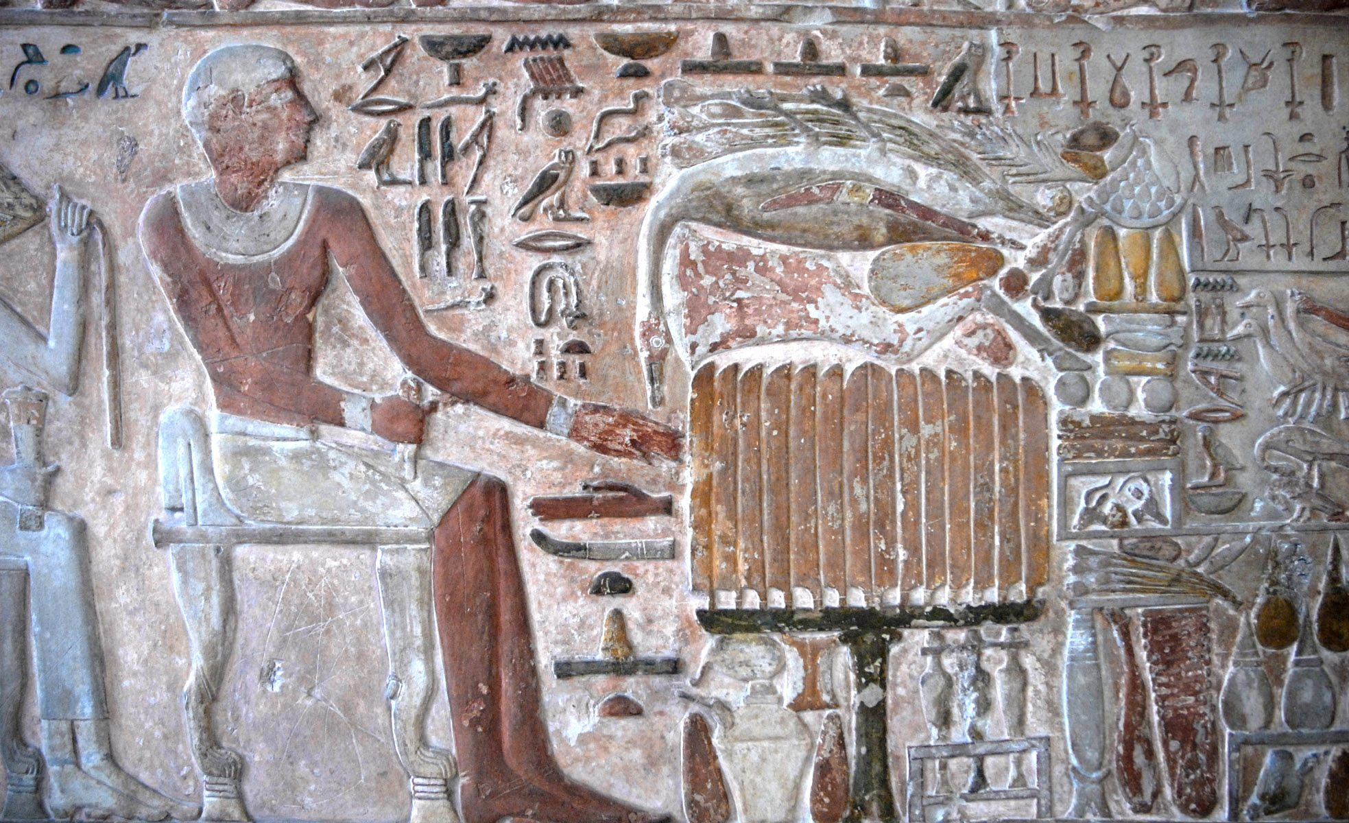 Détails de la stèle de Meru, montrant les offrandes faites au mort Règne de Mentuhotep II, (2000 av. J.C.) Calcaire, Thèbes